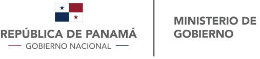 Logo del Ministerio de Gobierno de Panamá.